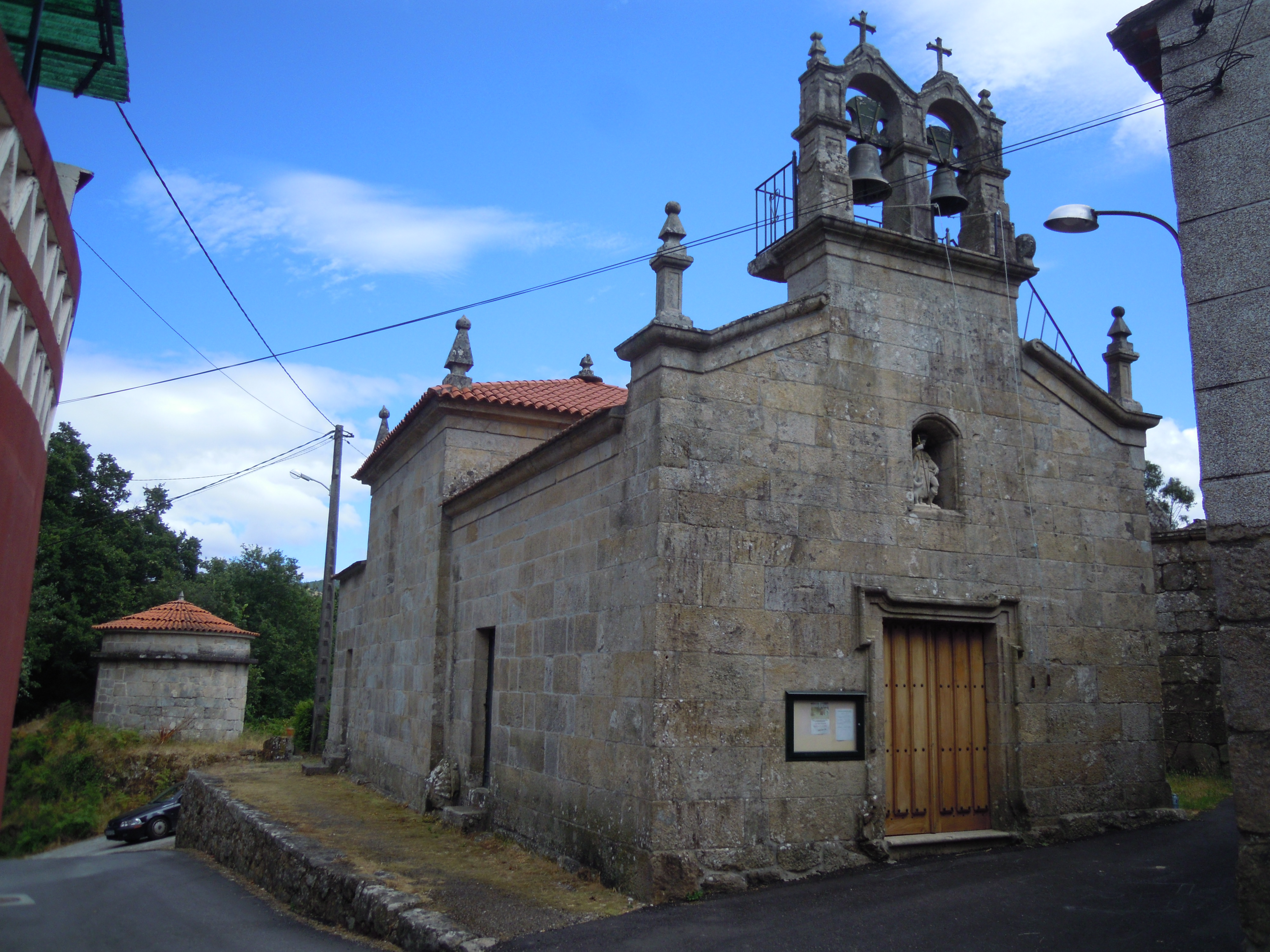 Igrexa de San Roque do Freixo (Crecente)